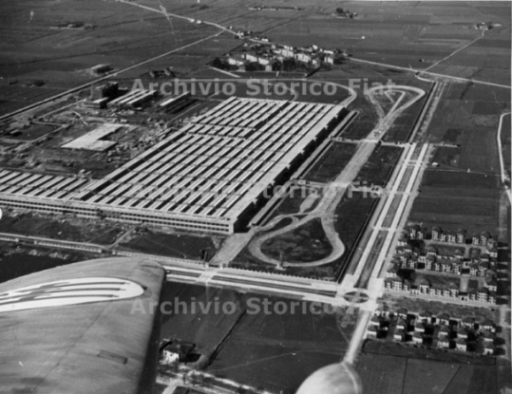 Fotografia aerea dello stabilimento Fiat Mirafiori, Torino (Fiat Group Marketing & Corporate Communication spa, Archivio e centro storico Fiat, Archivio iconografico, Album Monografici, album 36.5)